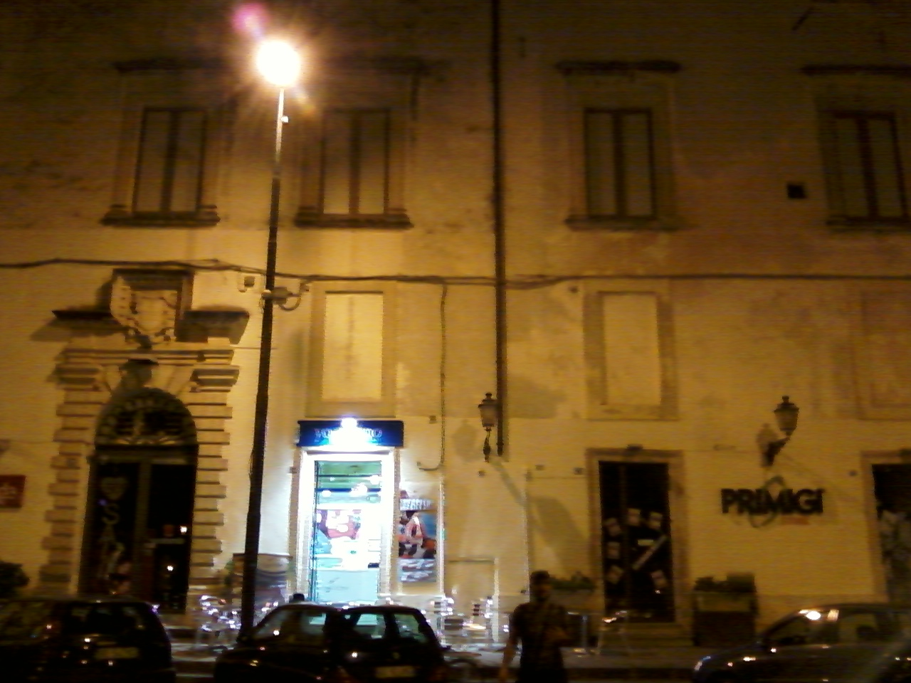 Castello Castriota Scanderbeg di Galatina